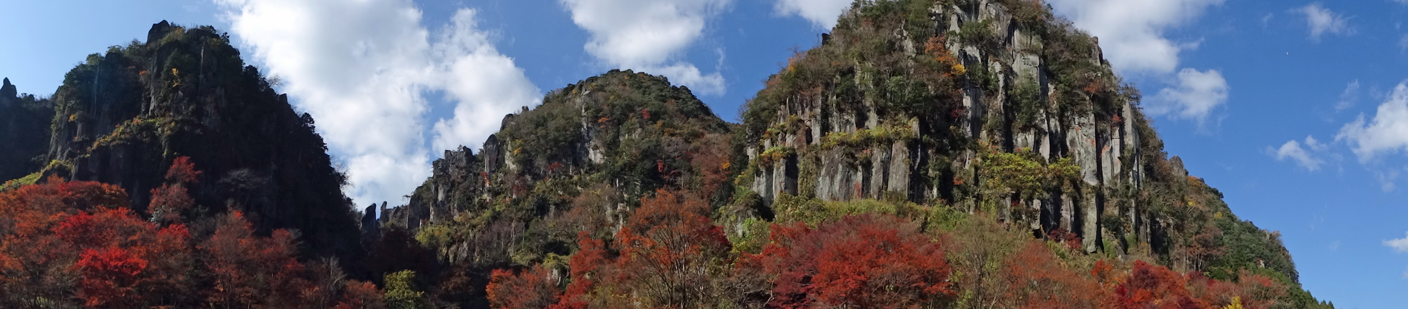 深耶馬渓の一目八景パノラマ写真